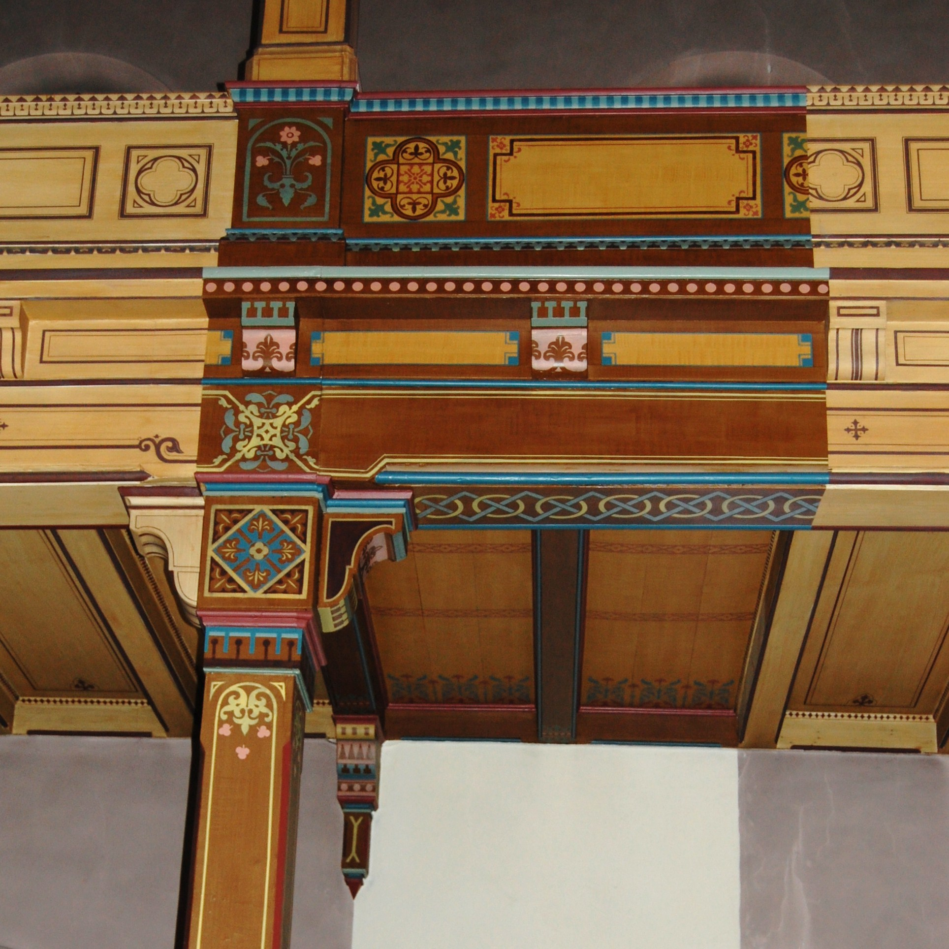 Protestantische Erlöserkirche in Bad Kissingen: Restaurierte Originalmalerei von 1891 an der Empore